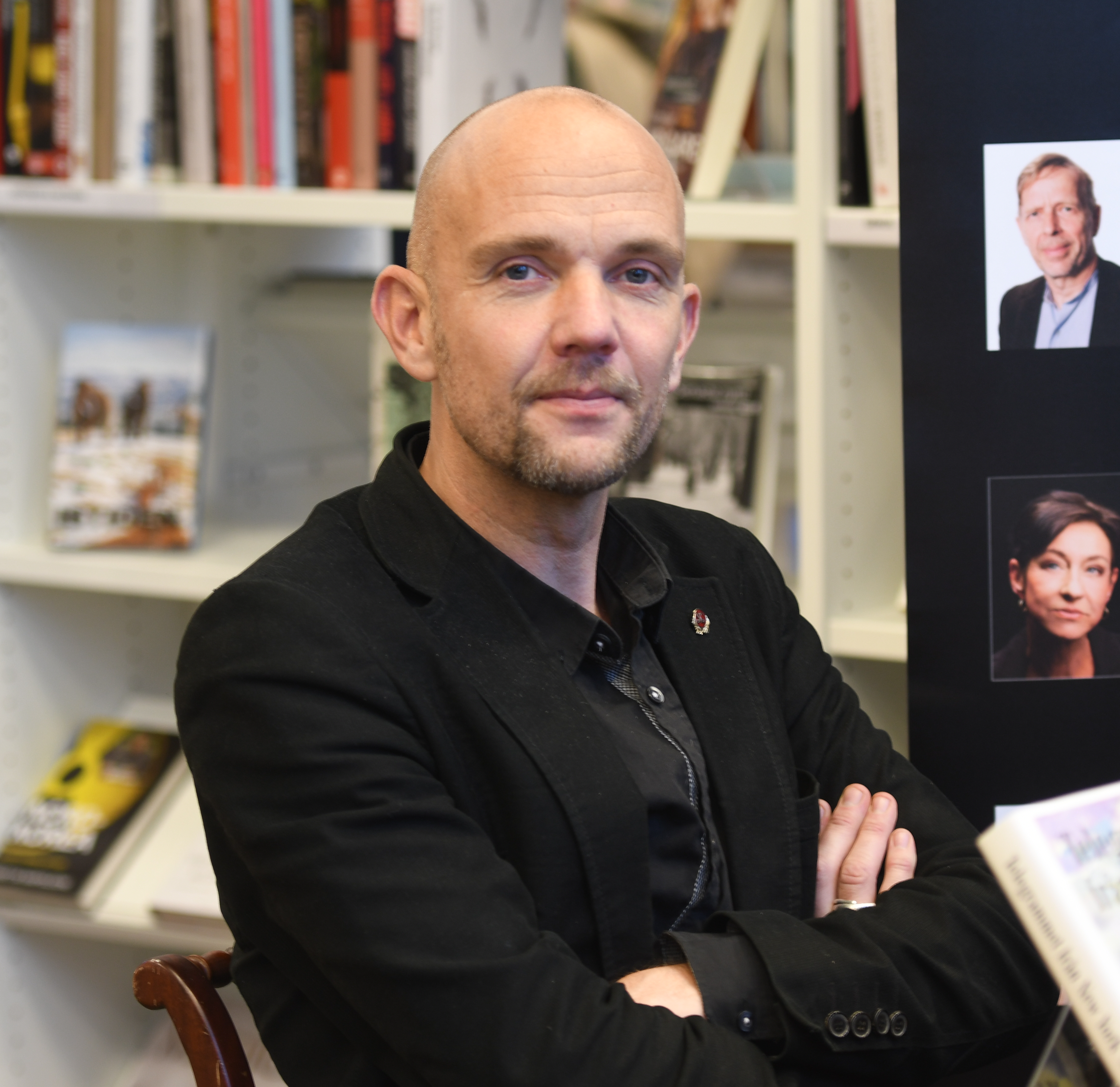 Garagets bokmässa 2018, Malmö. Stefan Bergmark vid Opulens bokbord.